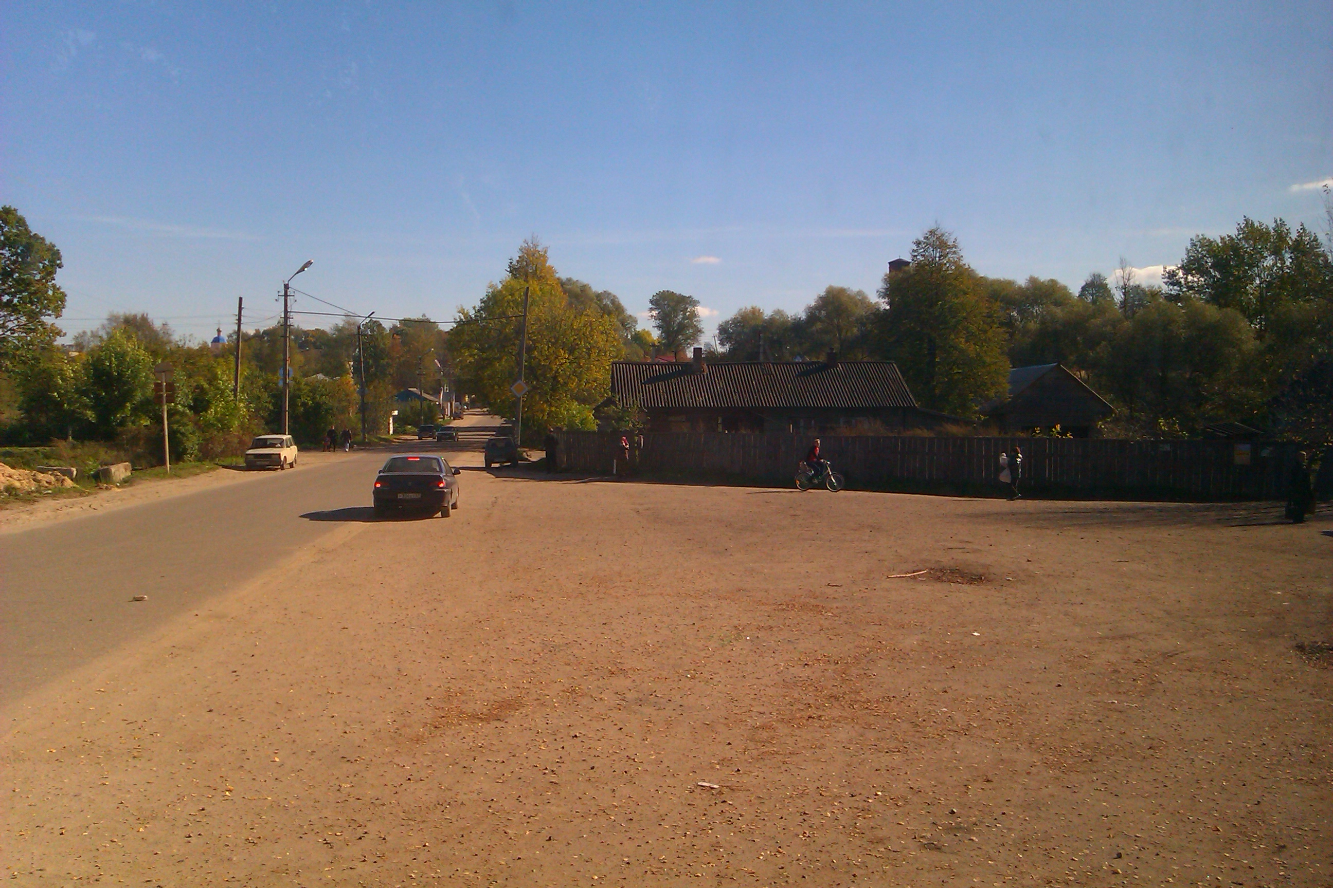 Dukhovshchina, Smolensk Oblast, Russia, 216200